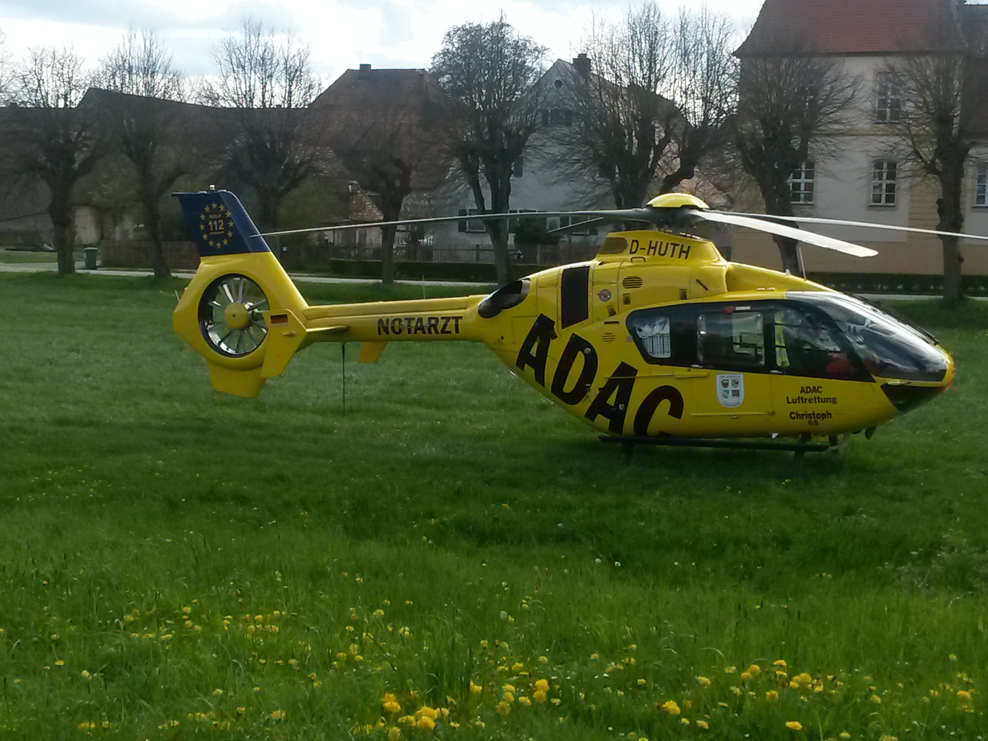 Rettungshubschrauber Christoph 65 gelandet bei einem Einsatz in Unterschwaningen